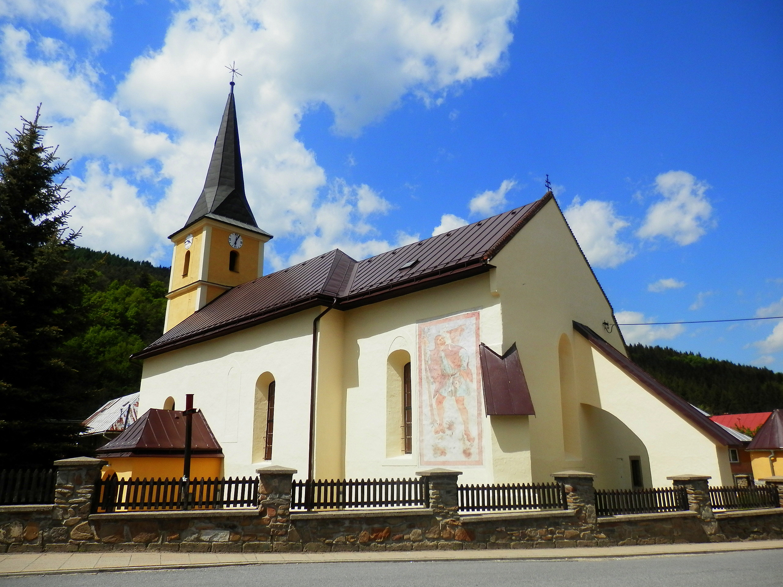 Kostol.Intravilán obce Nižný Slavkov, okres Sabinov.